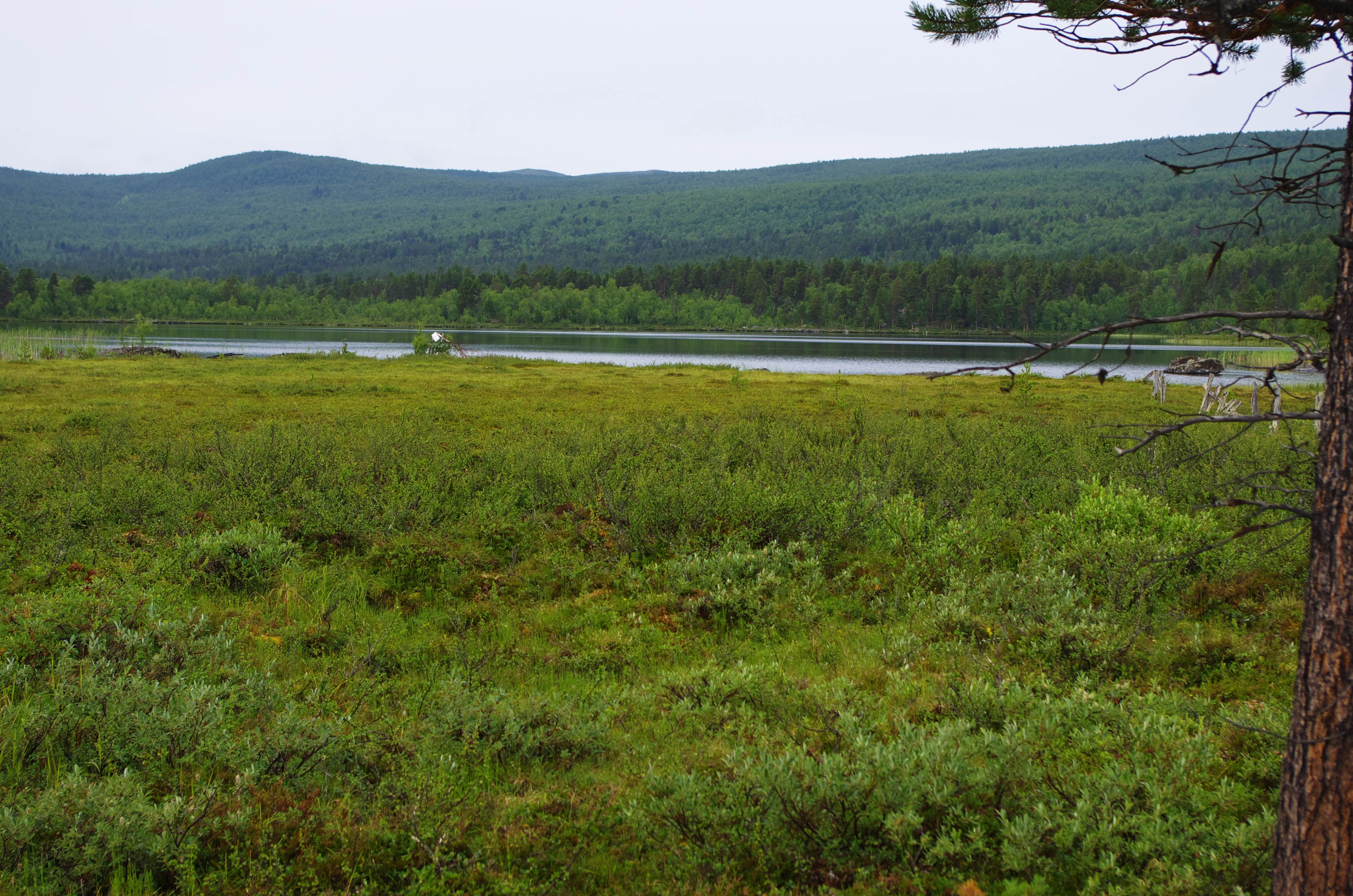 Fiskesjön Bietsik, även stavat Bietsek, i Arjeplogs kommun i Lappland.